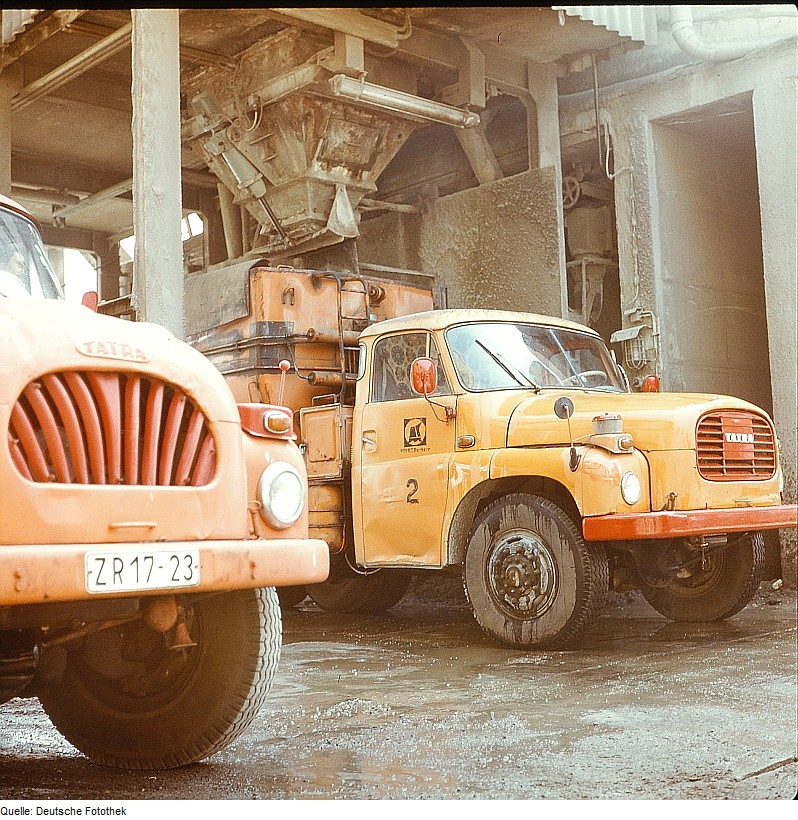 Original image description from the Deutsche FotothekBetonierer